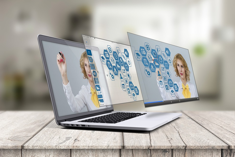 Perspectives de futur de la Realitat Augmentada